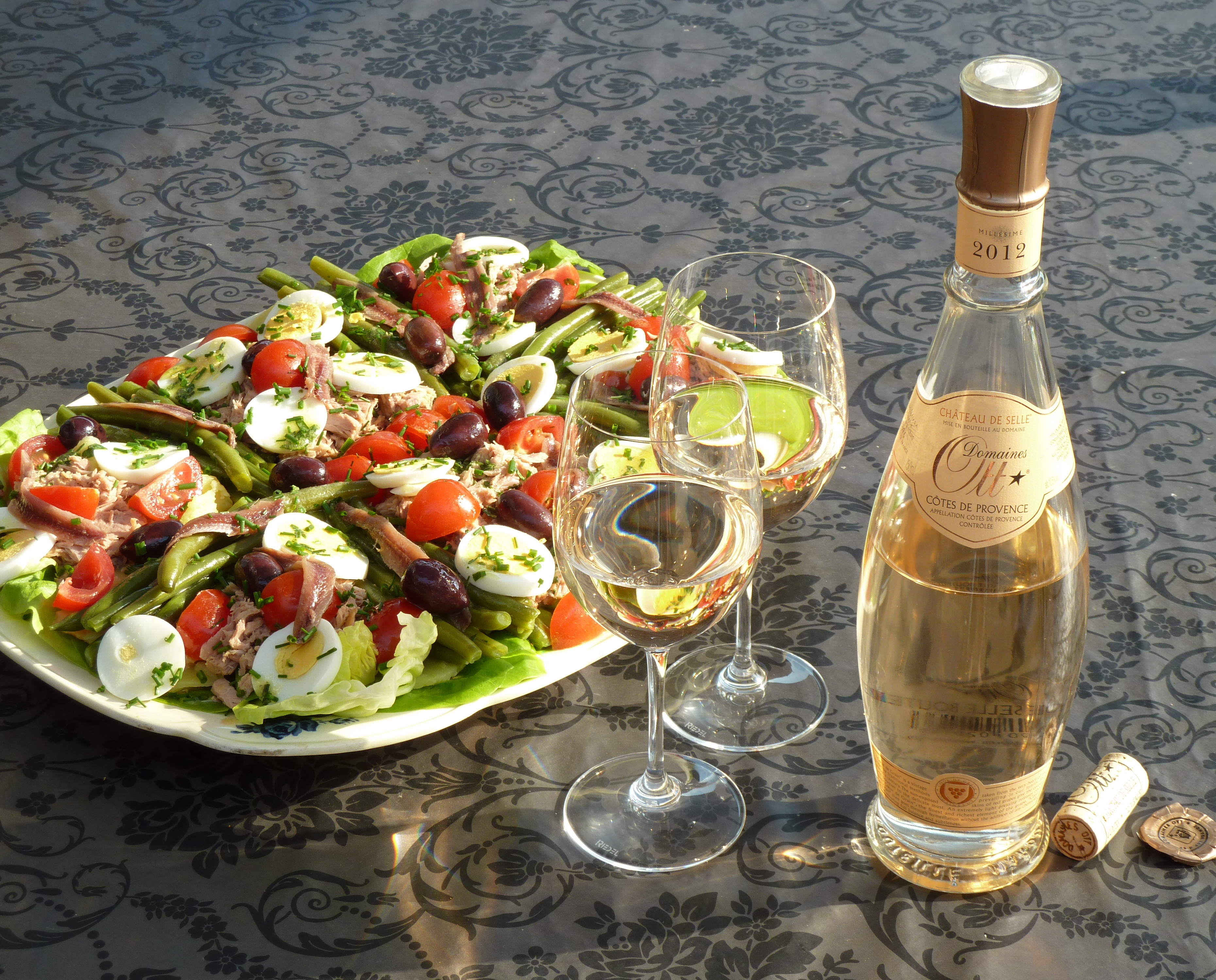 Salade niçoise avec rosé Château de Selle, Domaines Ott